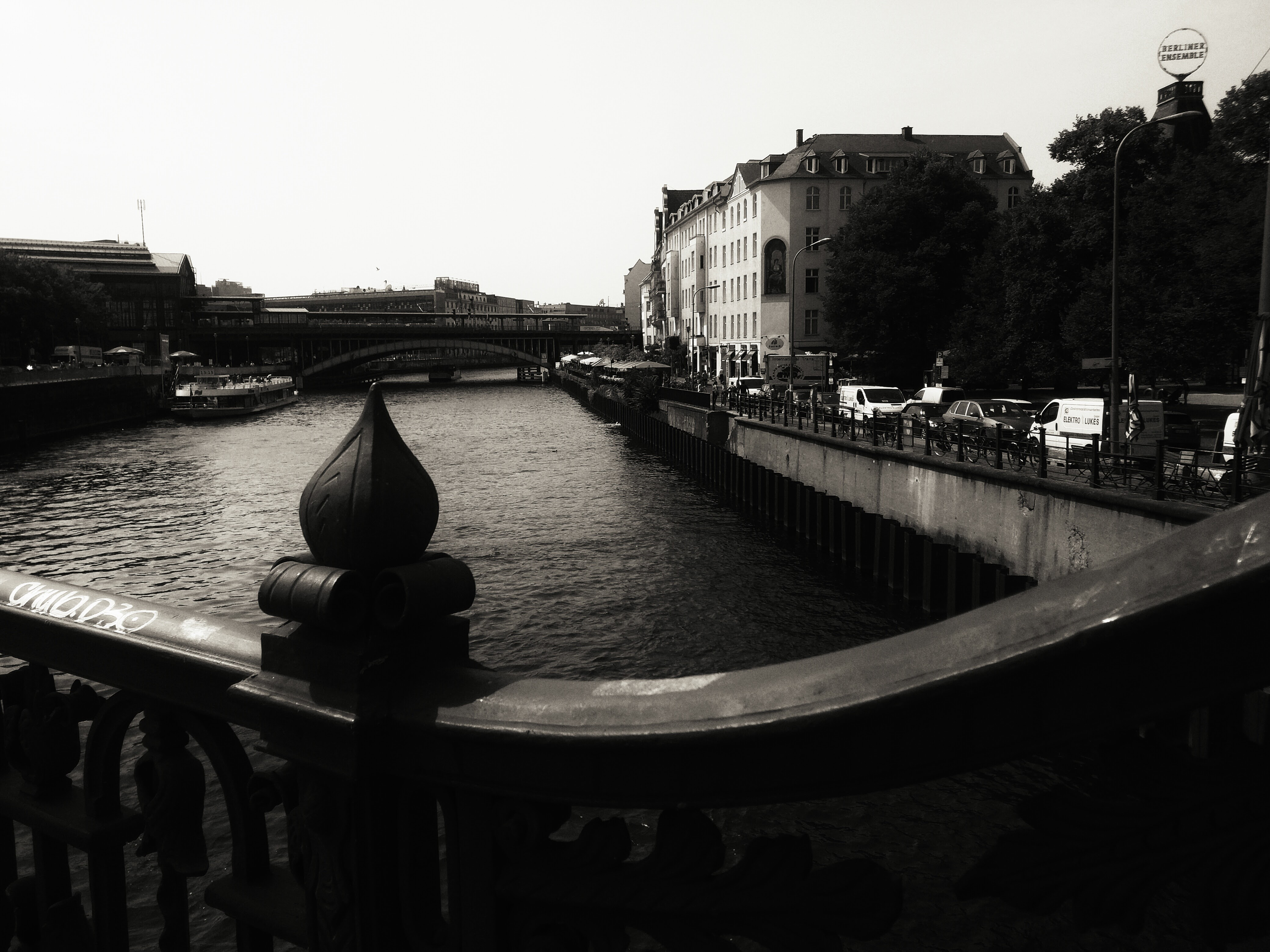 Berlin